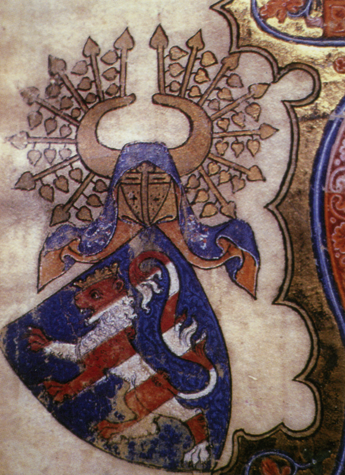 Wappen der hessischen Landgrafen in der von Heinrich II. veranlassten Prachthandschrift Willehalm-Kodex des Wolfram von Eschenbach – darin: Beginn des Epos Arabel von Ulrich von dem Türlin auf Seite 2, Initiale zu Beginn des Textes